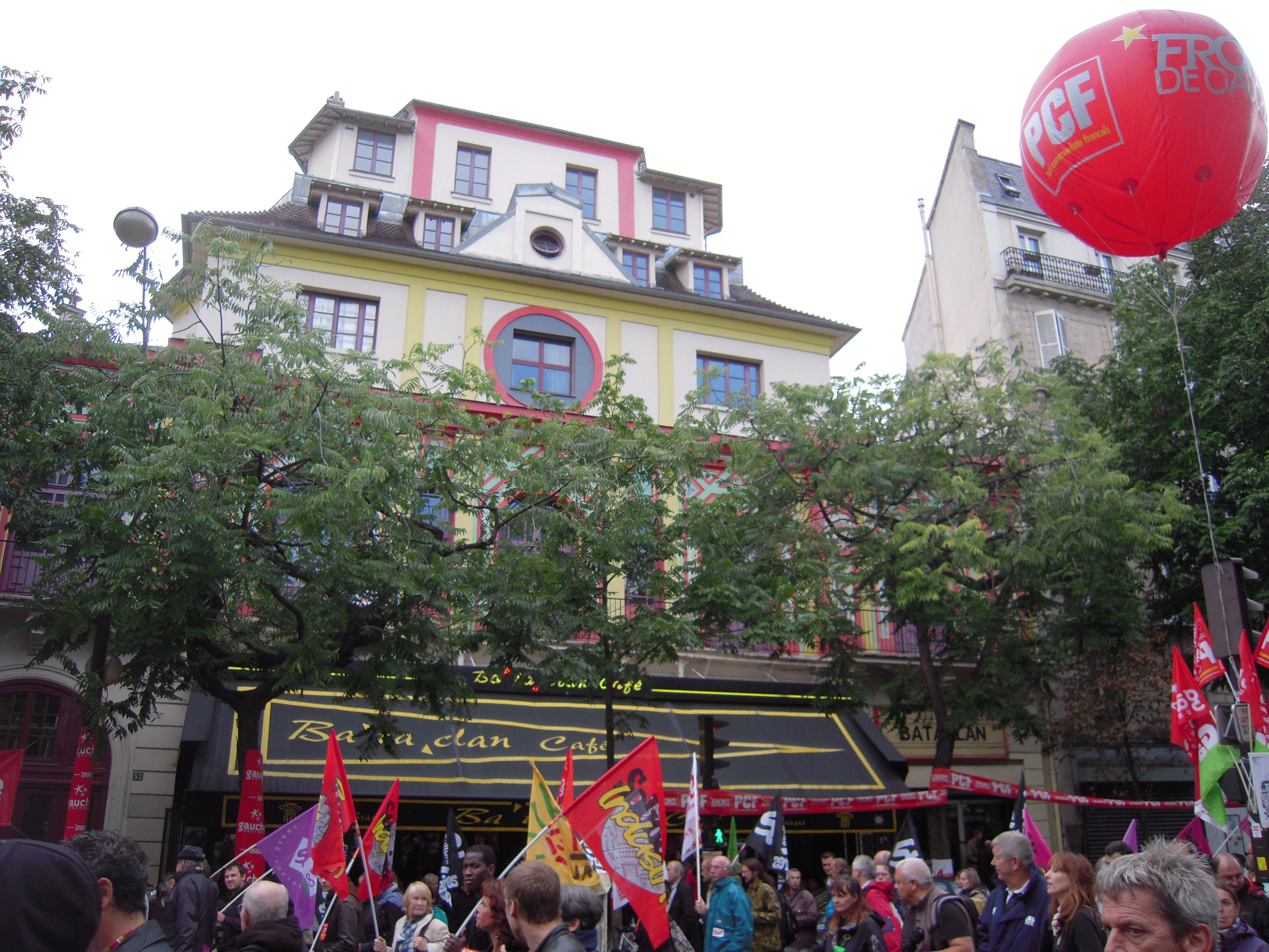 Le Bataclan était à l'origine un grand café-concert d'architecture chinoise, avec le café et le théâtre au rez-de-chaussée, et un grand dancing au premier étage..